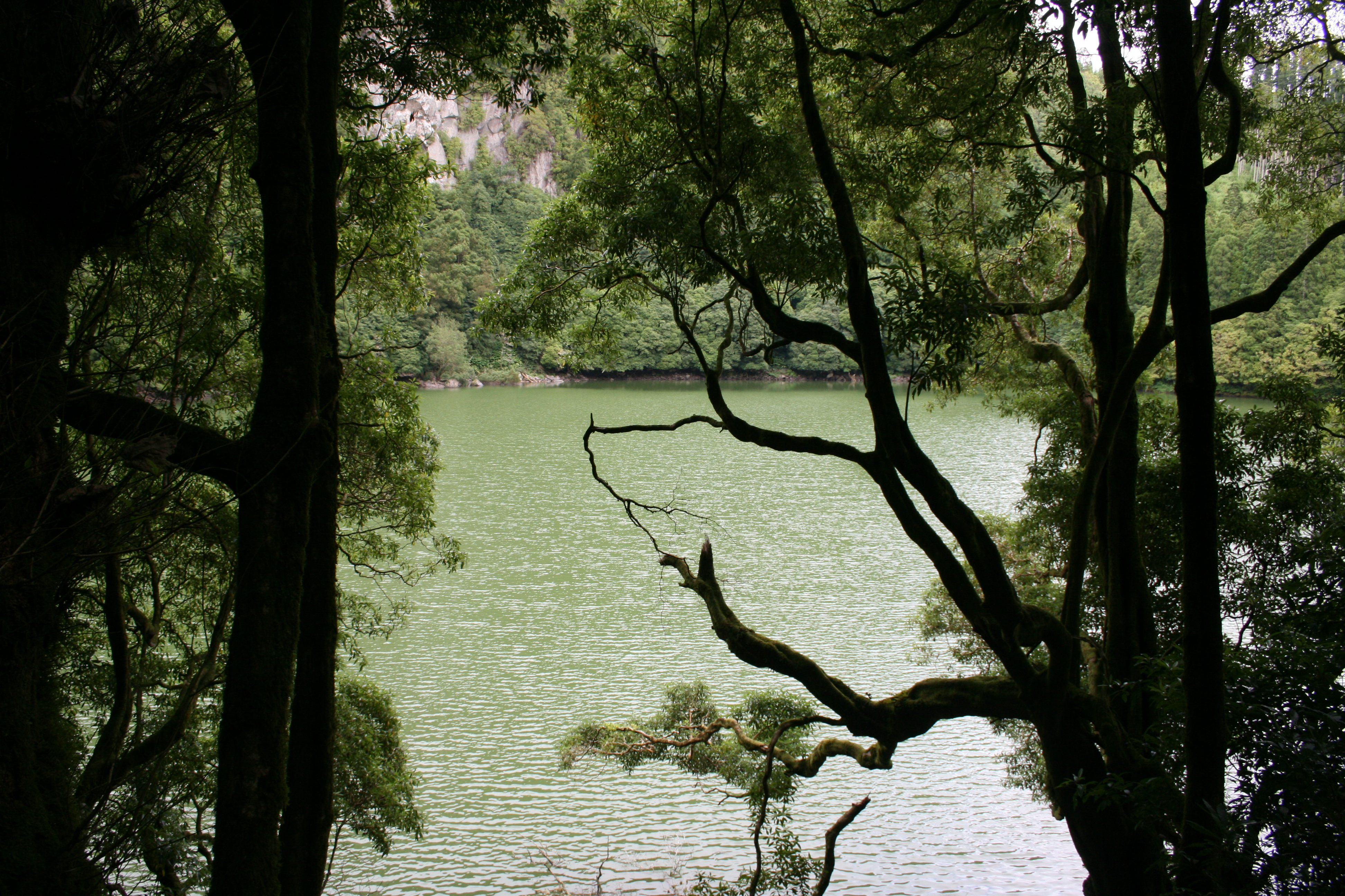 Azores - Sao Miguel Island . Lake Furnas